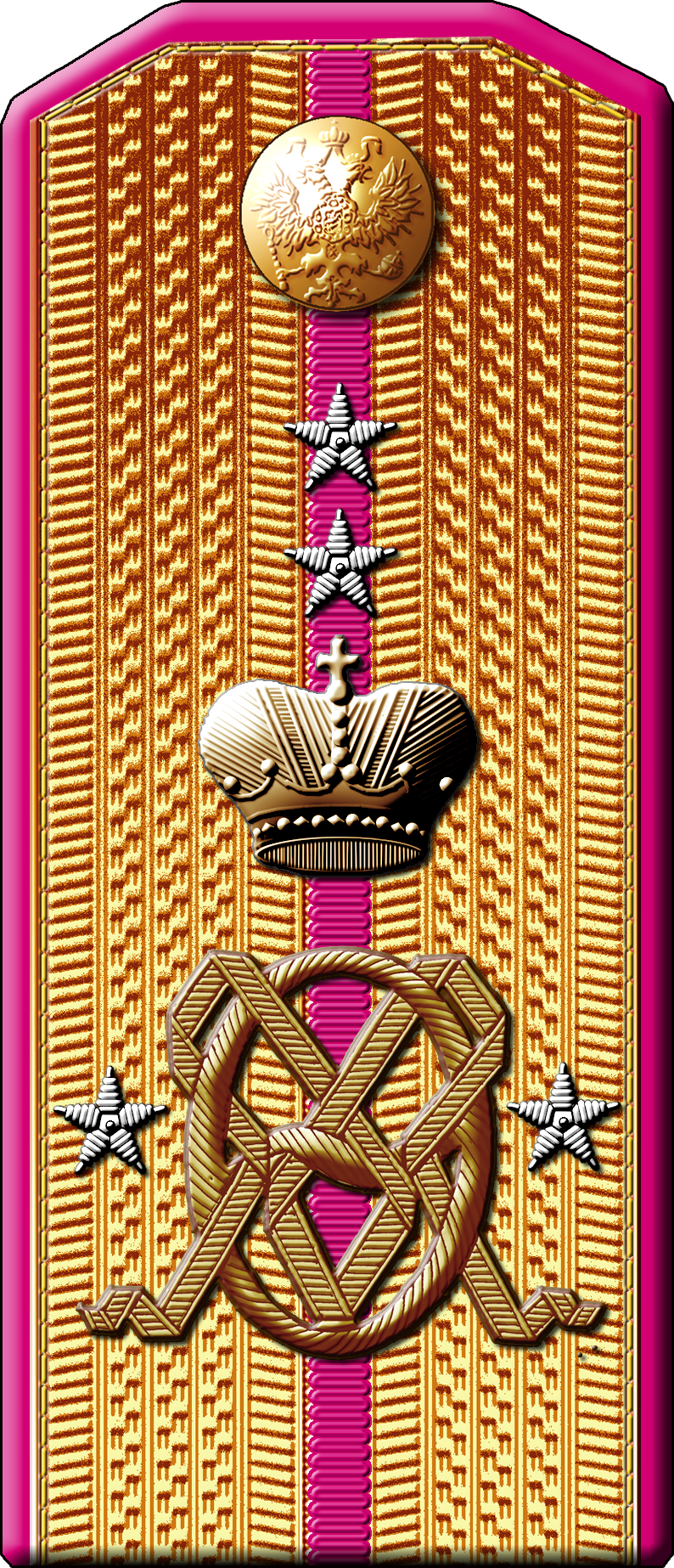 Российская Империя. Российская Императорская армия. 11-й Восточно-Сибирский стрелковый Её Императорского Величества Государыни Императрицы Марии Фёдоровны полк. Знаки различия по состоянию на 1907—1917 гг. Погон классного чина «Штабс-капитан». Источник: Приказ по Военному ведомству от 1907г. №441.